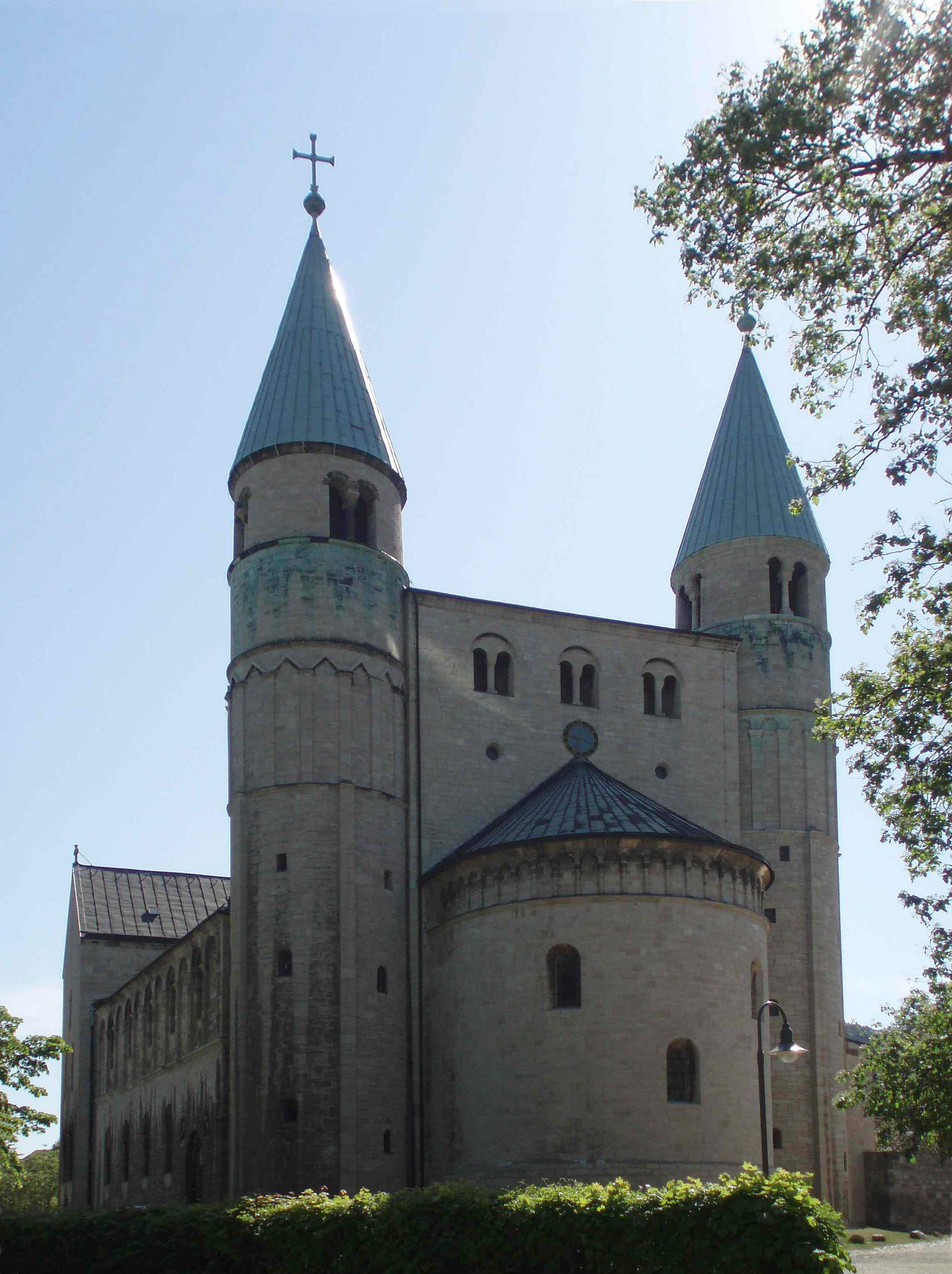 Westfront der Stiftskirche St. Cyriakus. Stiftskirche St. Cyriakus (Gernrode) - am 15.6.08 auf der Hauptseite.